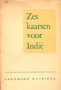 Uitgave van Huizinga's Zes Kaarsen voor Indië